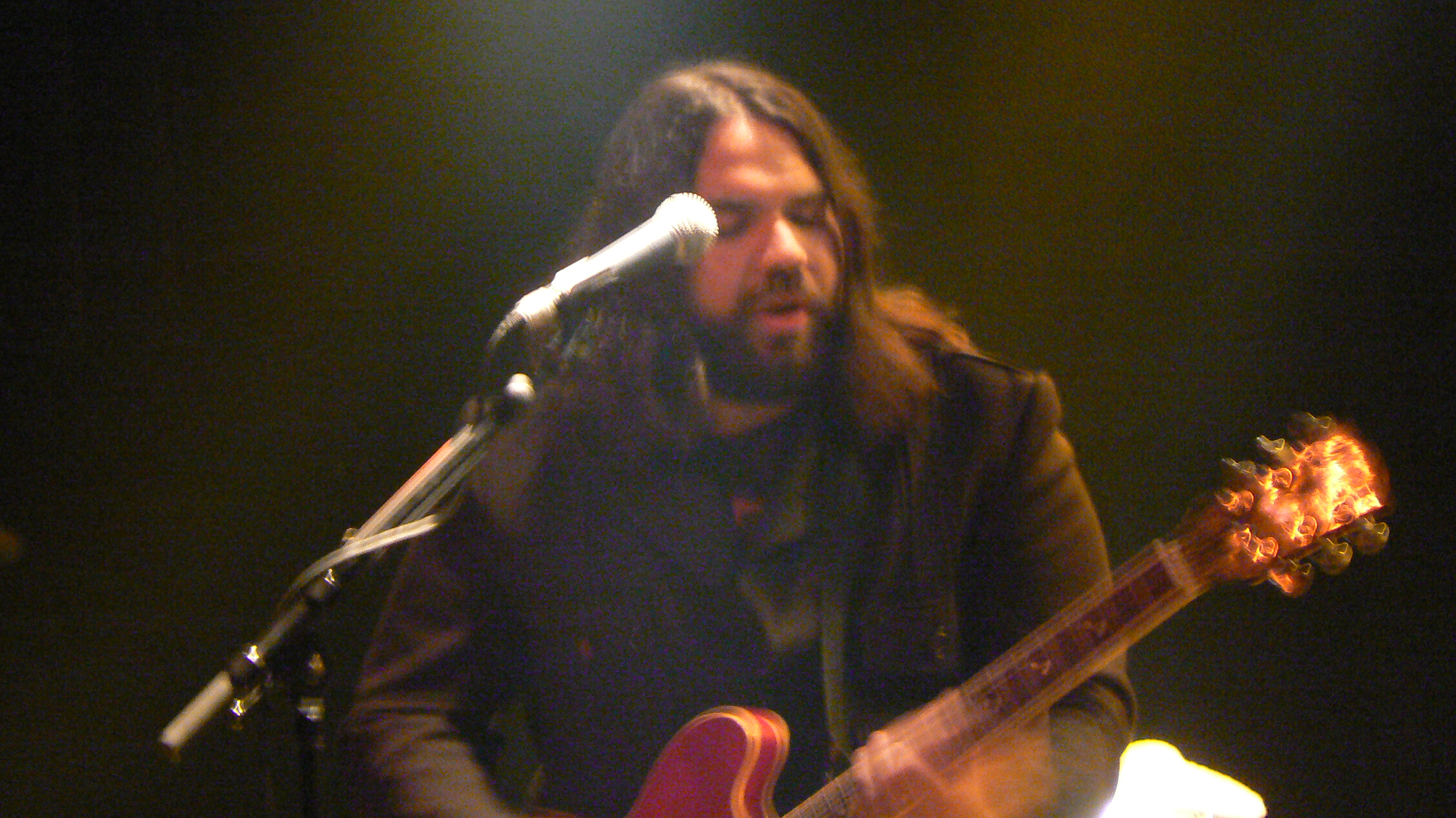 The Magic Numbers at Melkweg, Amsterdam (2006).